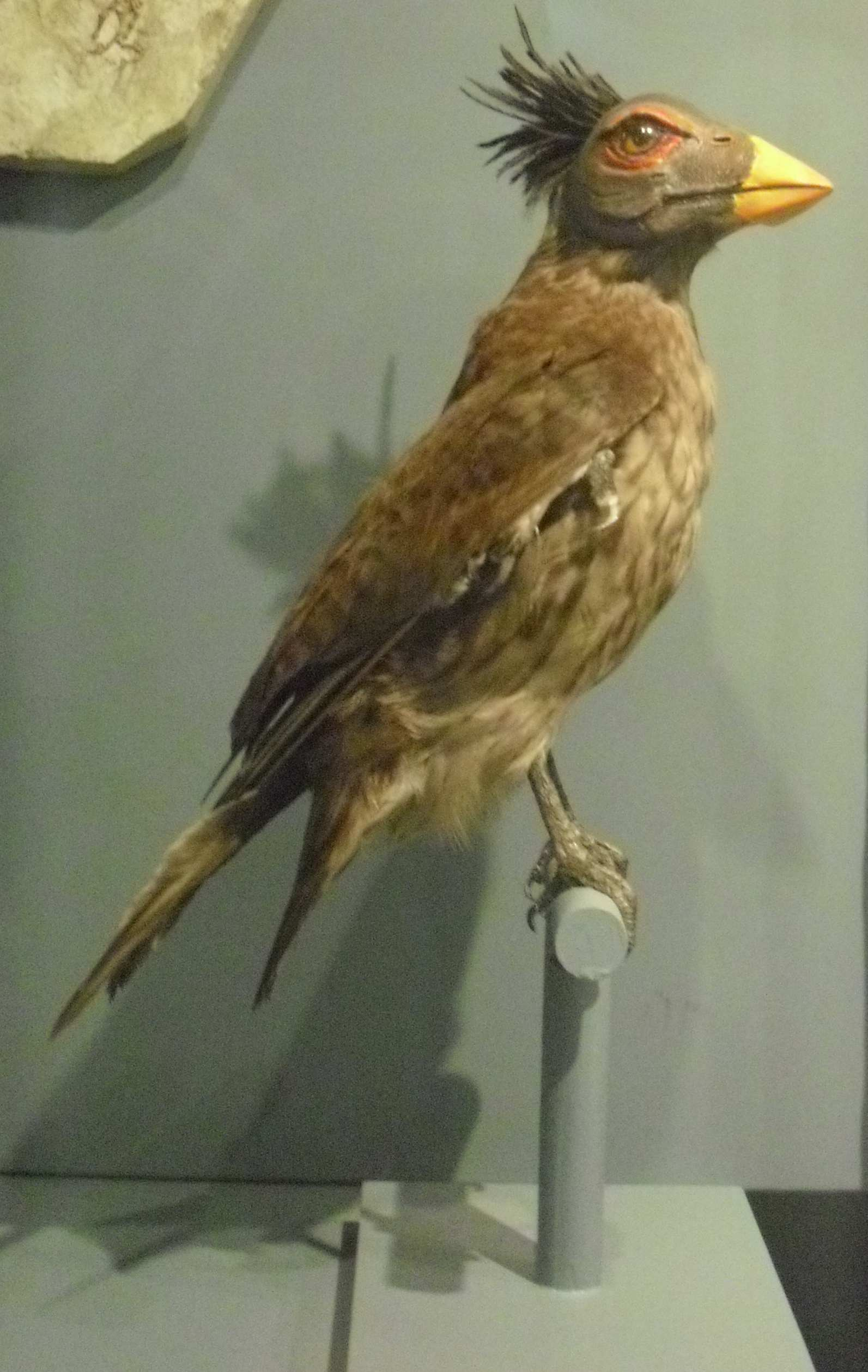 Confuciosornis_sanctus, Jura-Museum Eichstätt, Unterkreide, Lebendrekonstruktion